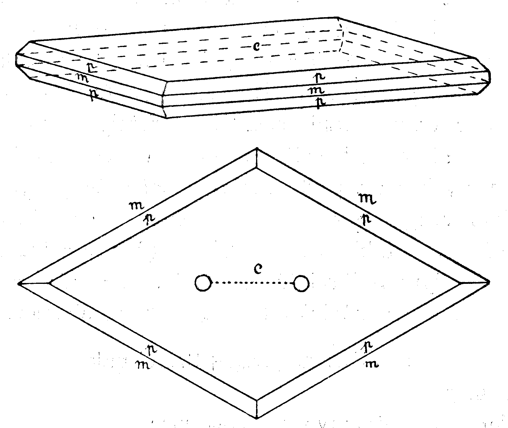 Romboklász kristály rajza (?)